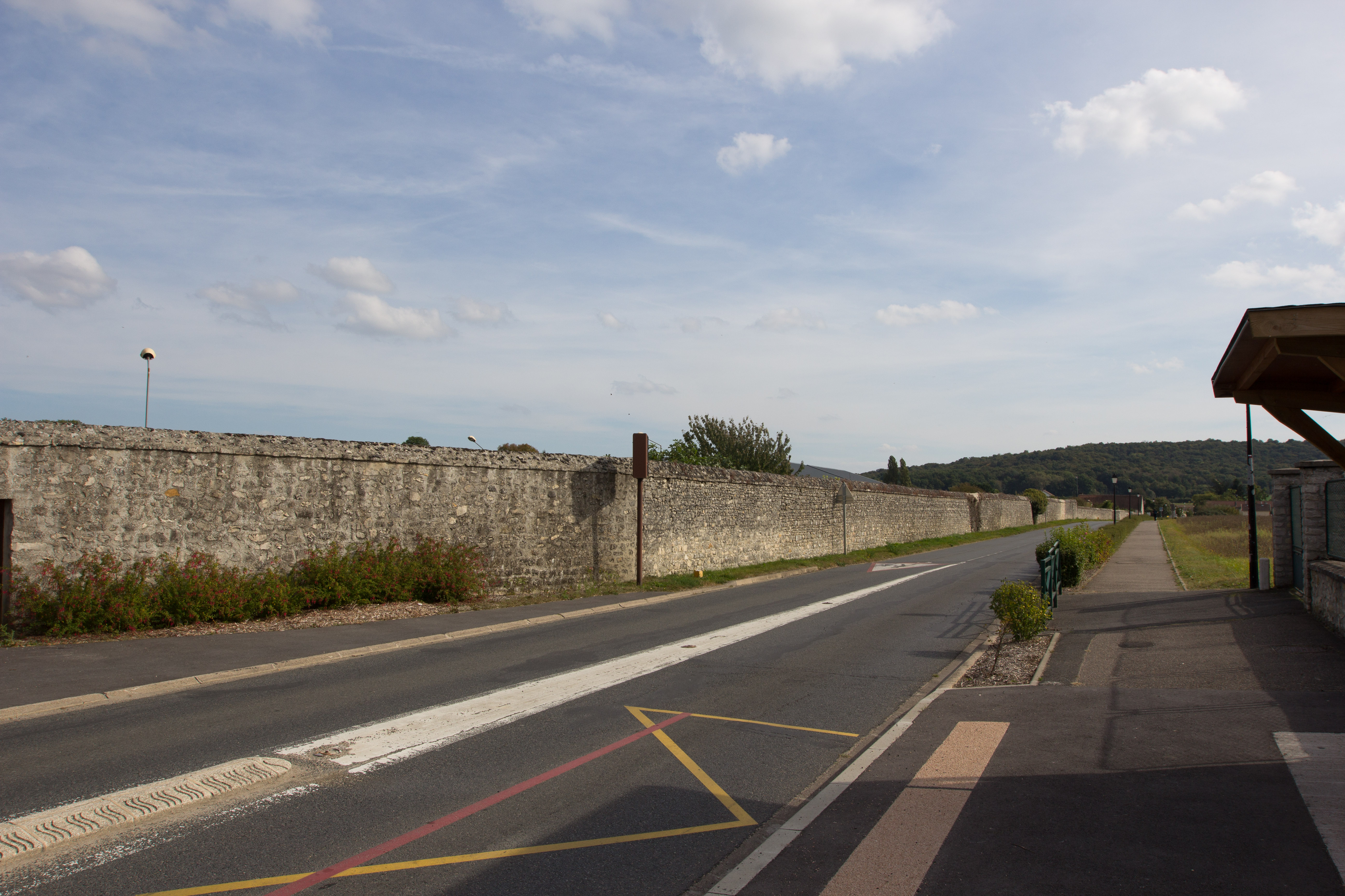 Vue de Vayres-sur-Essonne / Vayres-sur-Essonne / Essonne / France